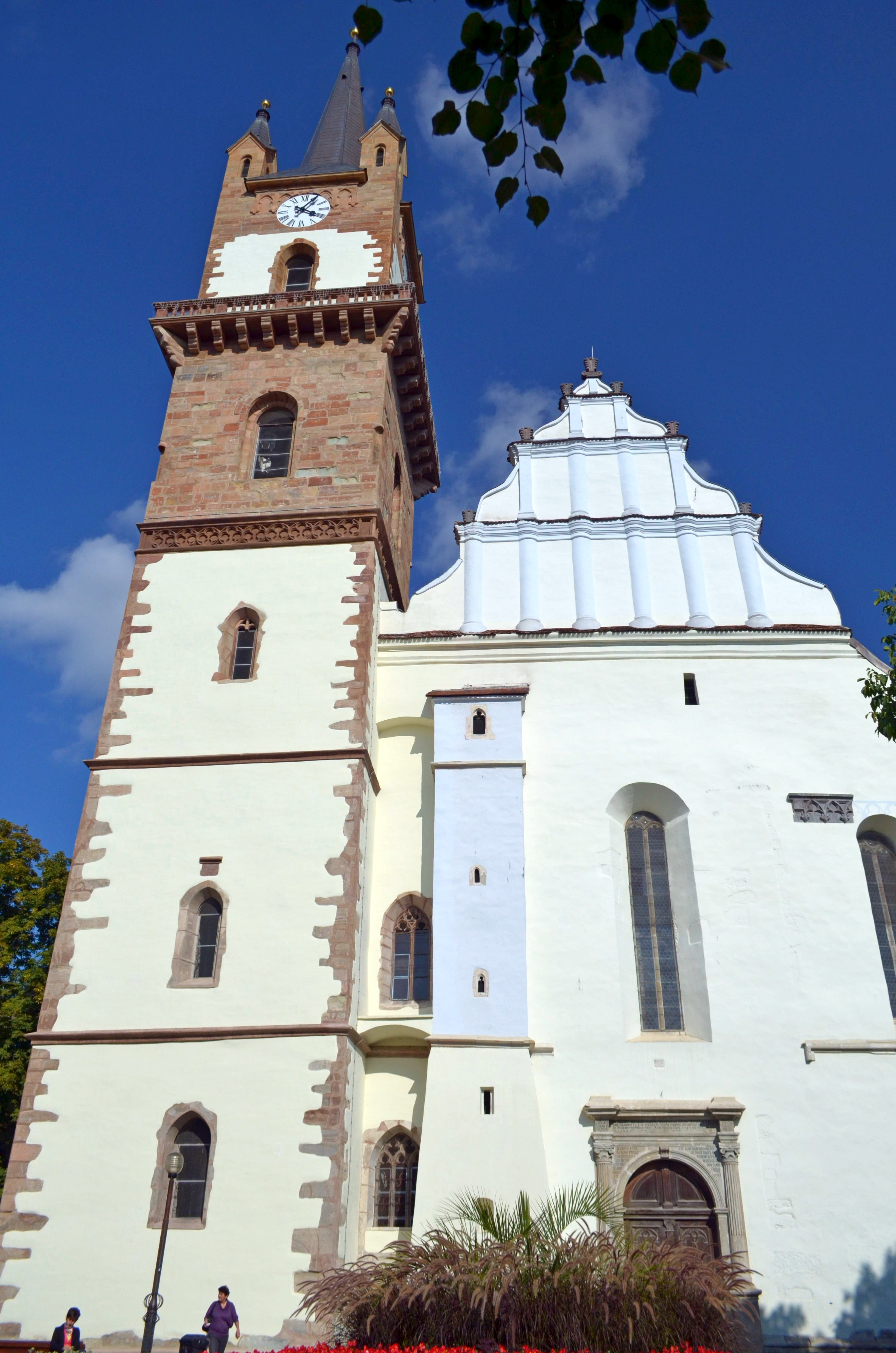 Fațada principală renovată a Bisericii Evangheliceă din Bistrița